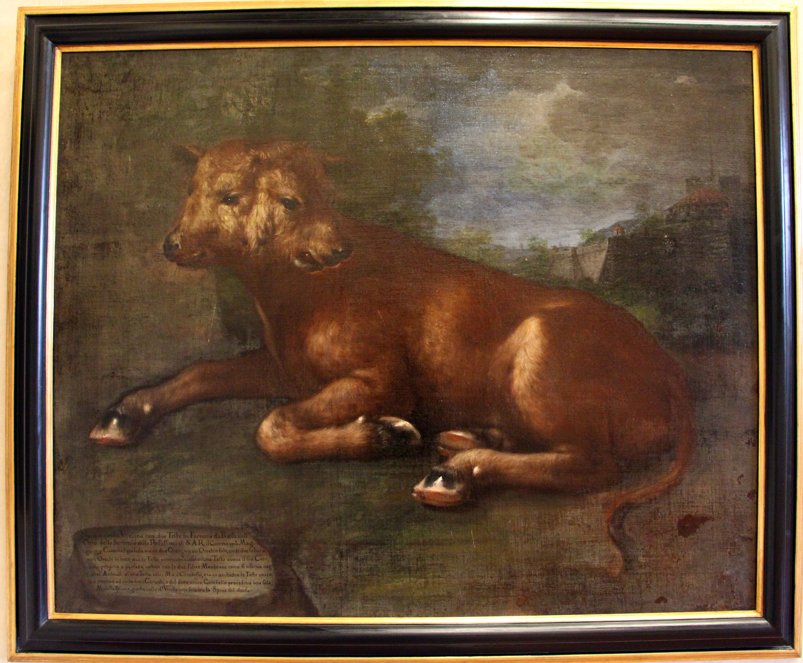 Villa medicea di Poggio a Caiano - MIBAC The making of this document was supported by Wikimedia CH. (Submit your project!) For all the files concerned, please see the category Supported by Wikimedia CH. This is a photo of a monument which is part of cultural heritage of Italy.